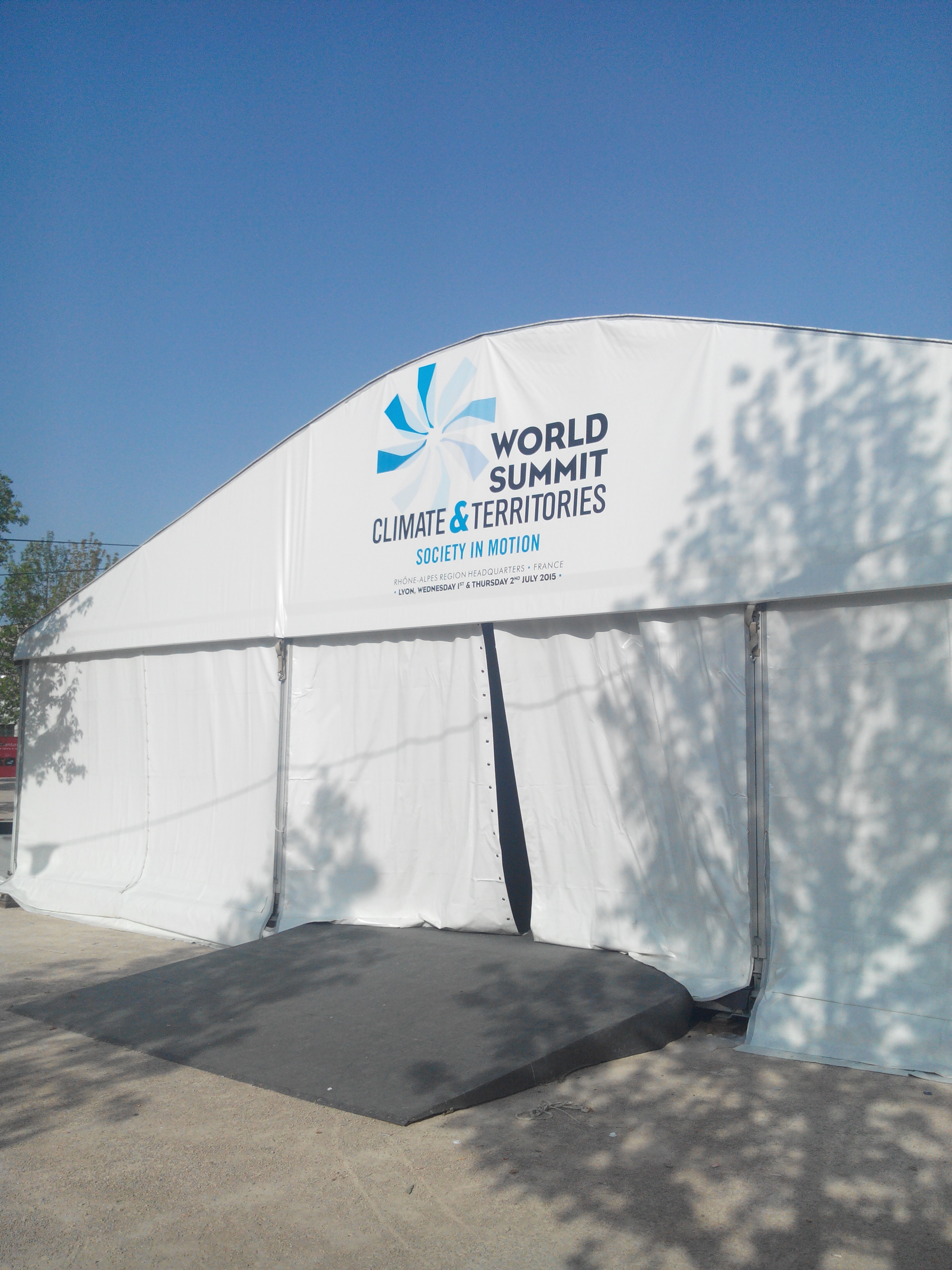 Entrée du chapiteau du World Summit Climate & Territories, organisé le 1er et le 2 juillet 2015, dans le quartier de la Confluence, dans le 2e arrondissement de Lyon.